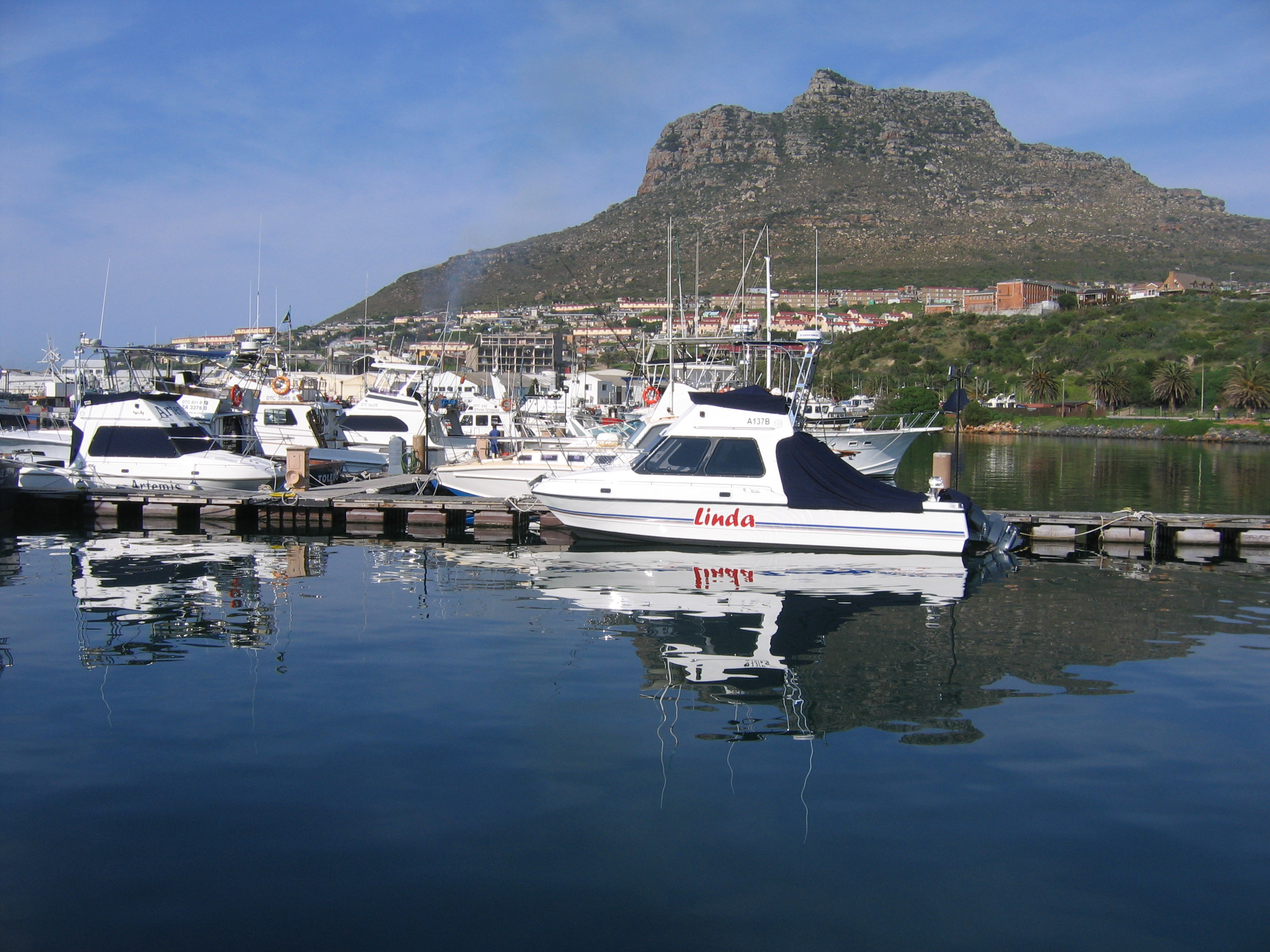 Hout Bay, province de Cap-Occidental, en Afrique du Sud